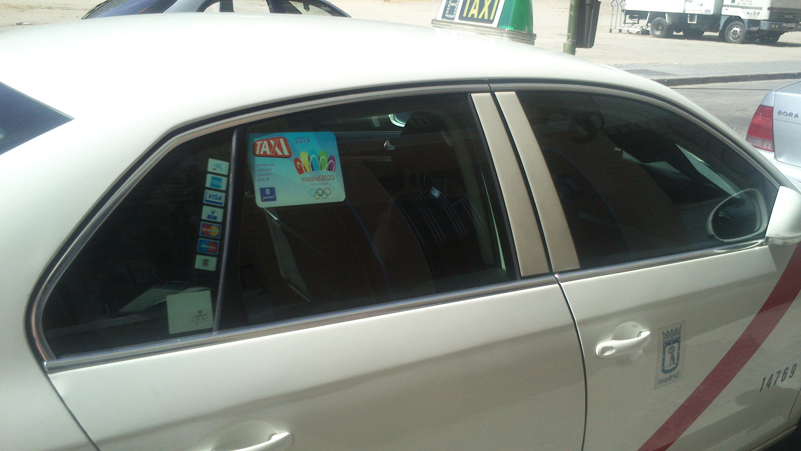 Un taxi de Madrid hace publicidad de la candidatura de MADRID2020